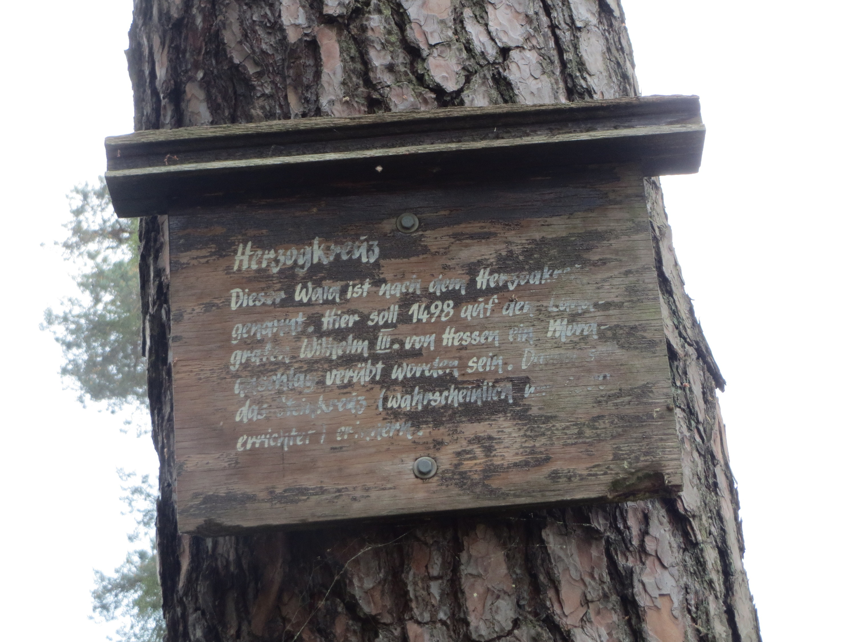 Schild im Schwetzinger Hardt